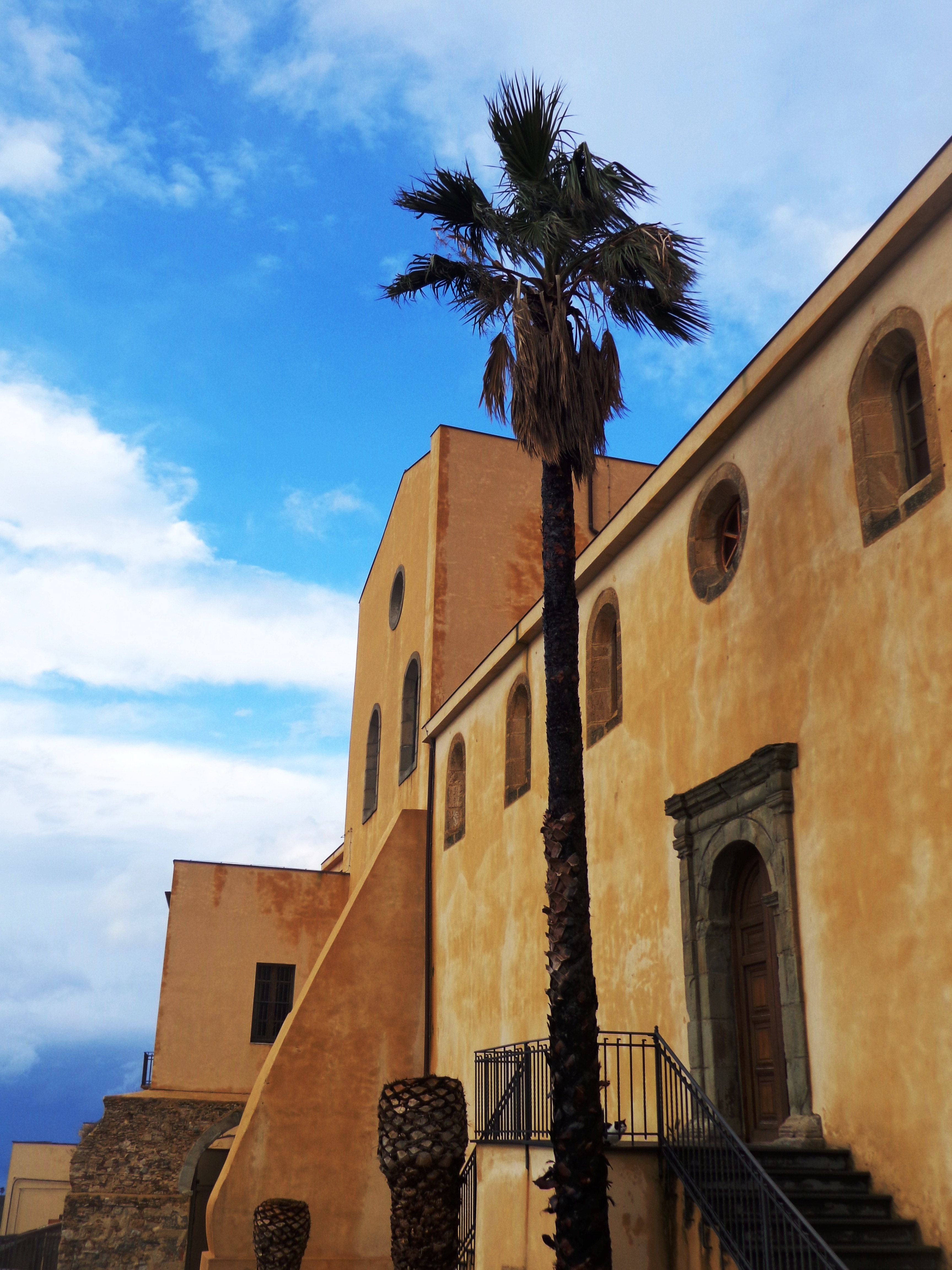 Duomo ovest